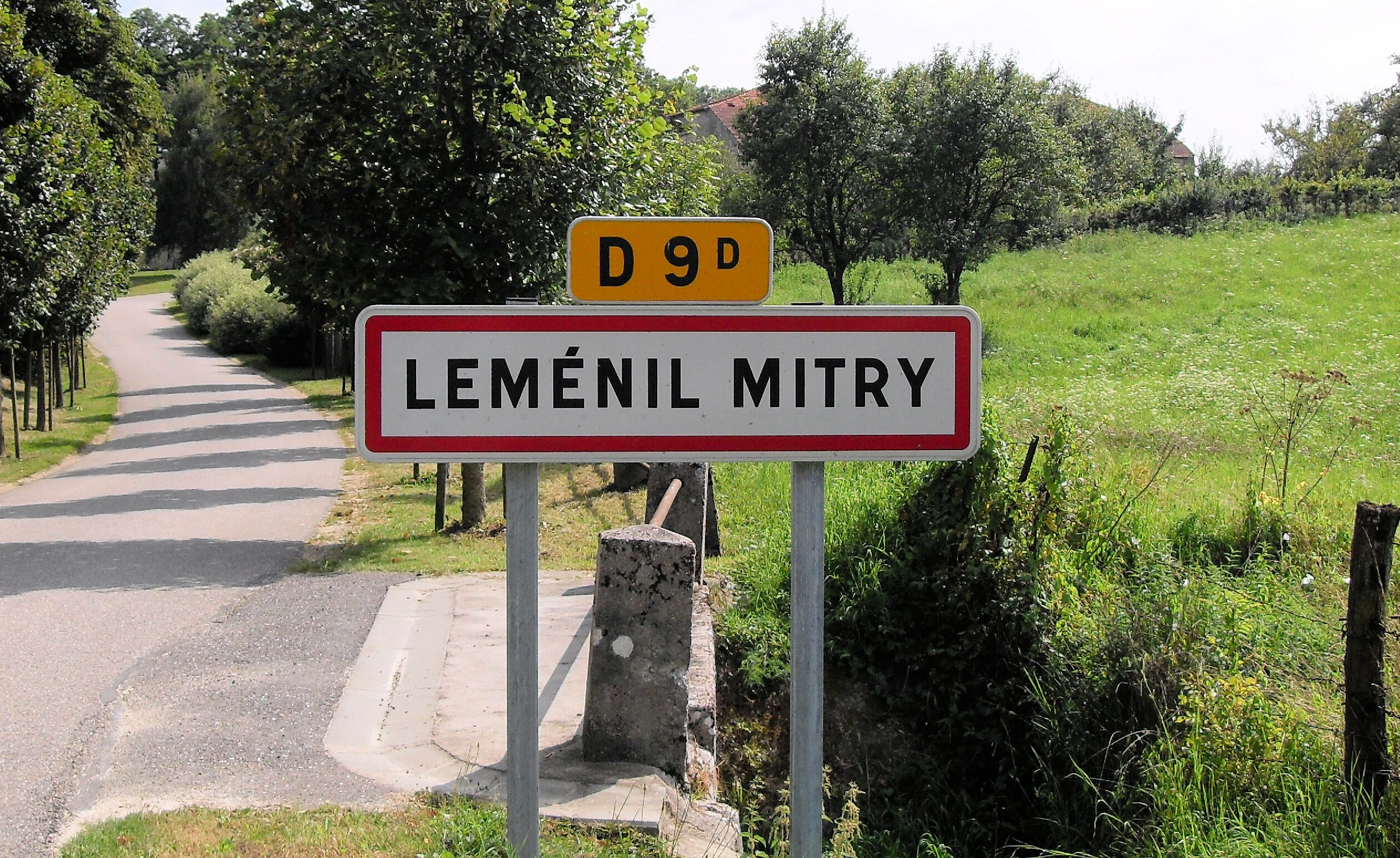 Leménil-Mitry, cette commune est citée comme celle ayant le plus faible nombre d'habitants des communes de Lorraine